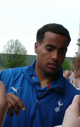 Tom Huddlestone